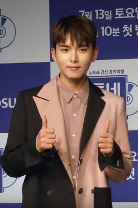 9일 오후 서울시 영등포구 여의도 서울마리나에서 TV조선 '동네앨범' 제작발표회가 열려 슈퍼주니어 려욱이 참석해 포토타임을 갖고 있다.